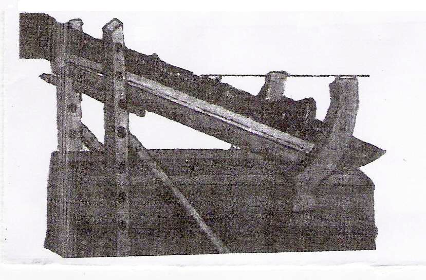 a picture from the medival Arabic military book "al izz wal rifa'a" by Ibrahim ibn Ahmad ibn Ghanim al-Andalusi صورة من كتاب العز والرفعة والمنافع مجاهدين في سبيل الله بالمدافع تمثل المدفع العربي